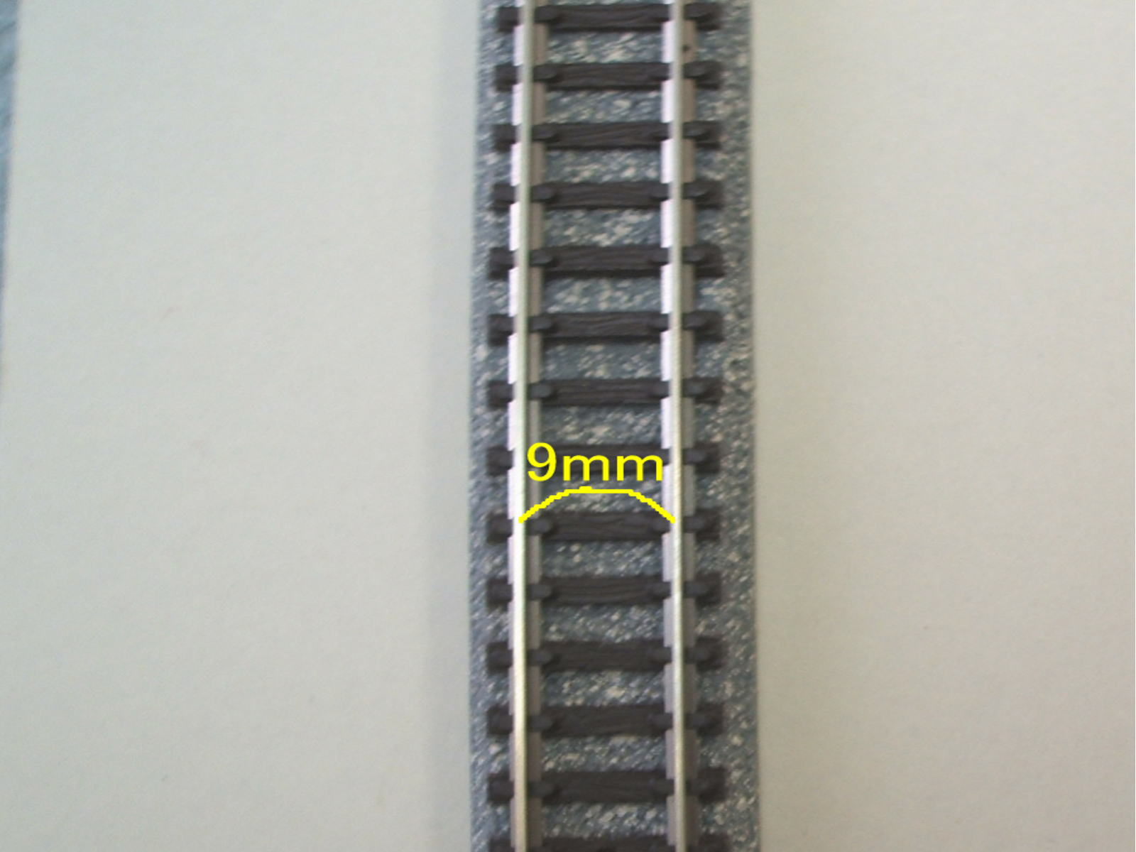 Nゲージの線路。軌間9mmを示すため。線路自体はTOMIX製品S280。